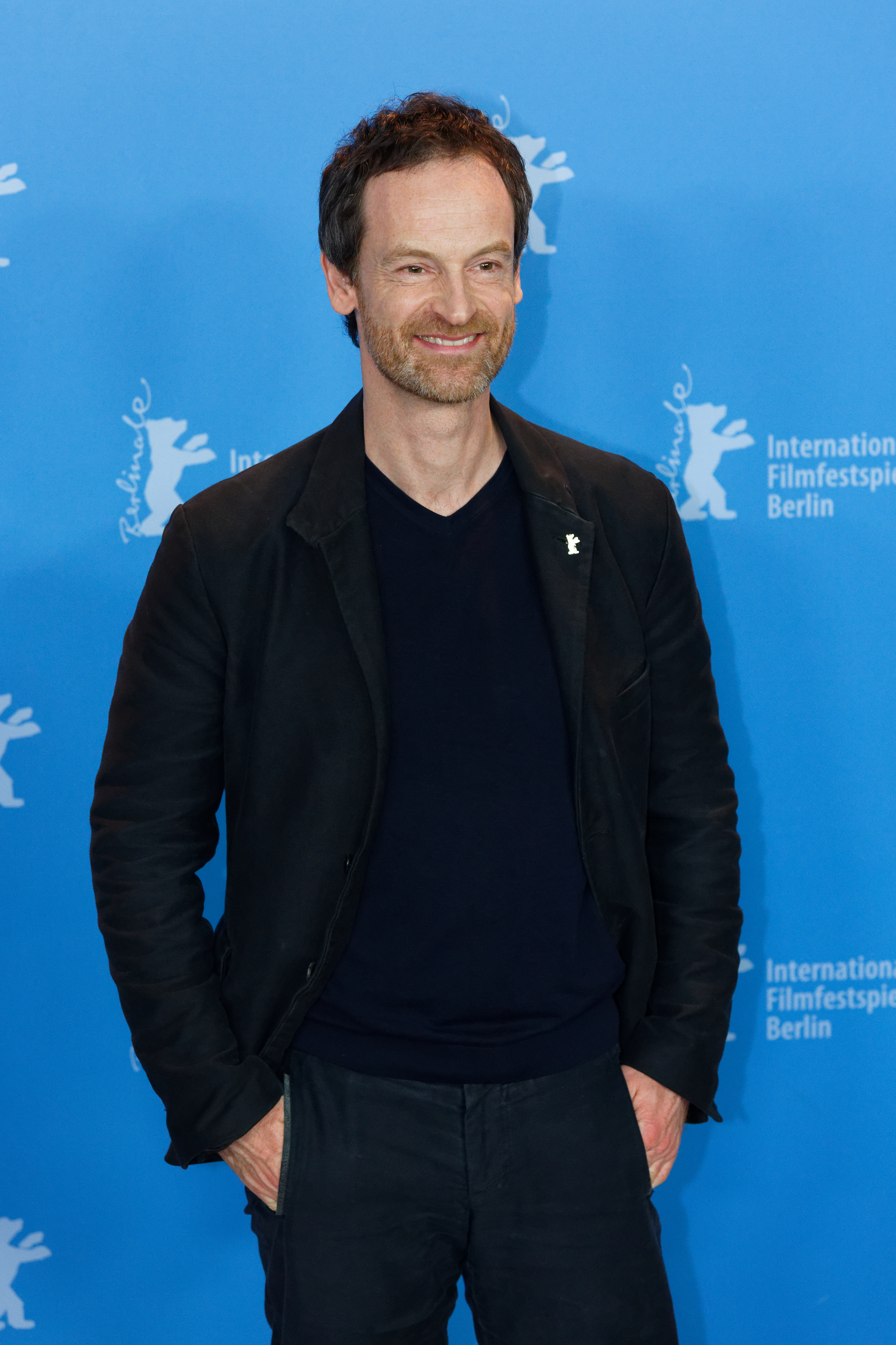 Jörg Hartmann beim Photo Call zu Wilde Maus bei der Berlinale 2017